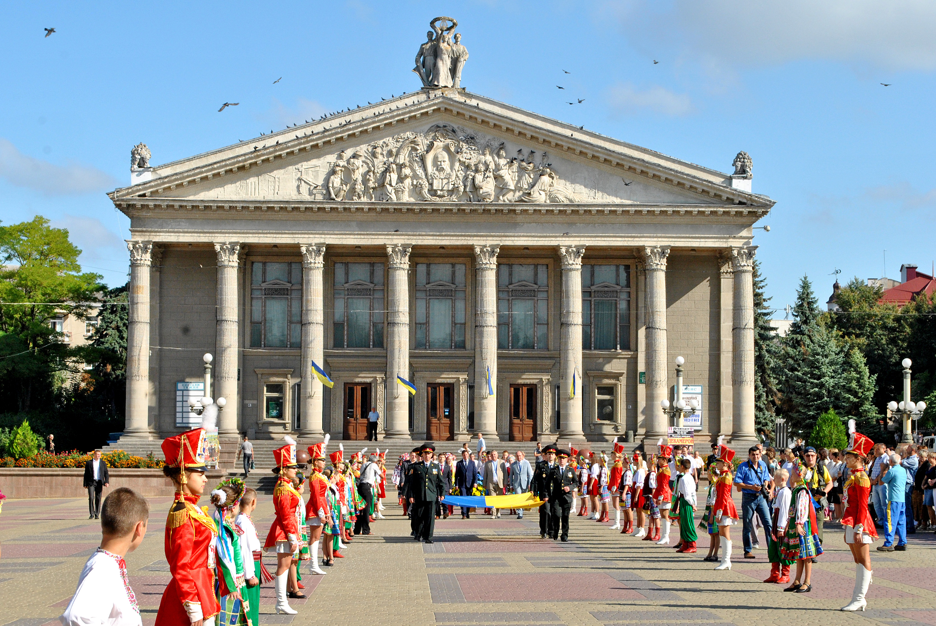 День Прапора на Театральному майдані в Тернополі. Тернопільський академічний обласний драматичний театр ім. Т. Г. Шевченка